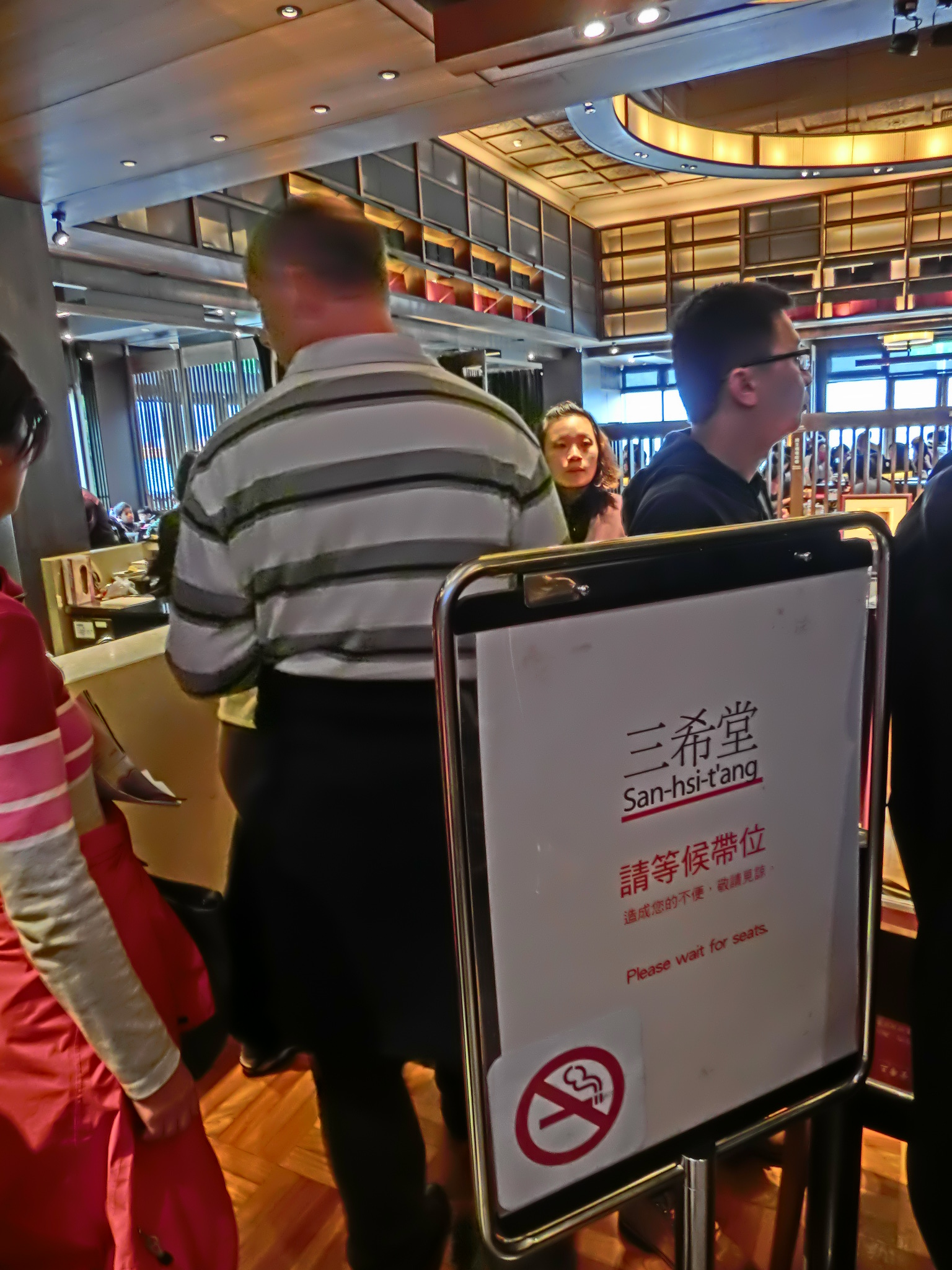 國立故宮博物院三希堂茶館等候帶位處。